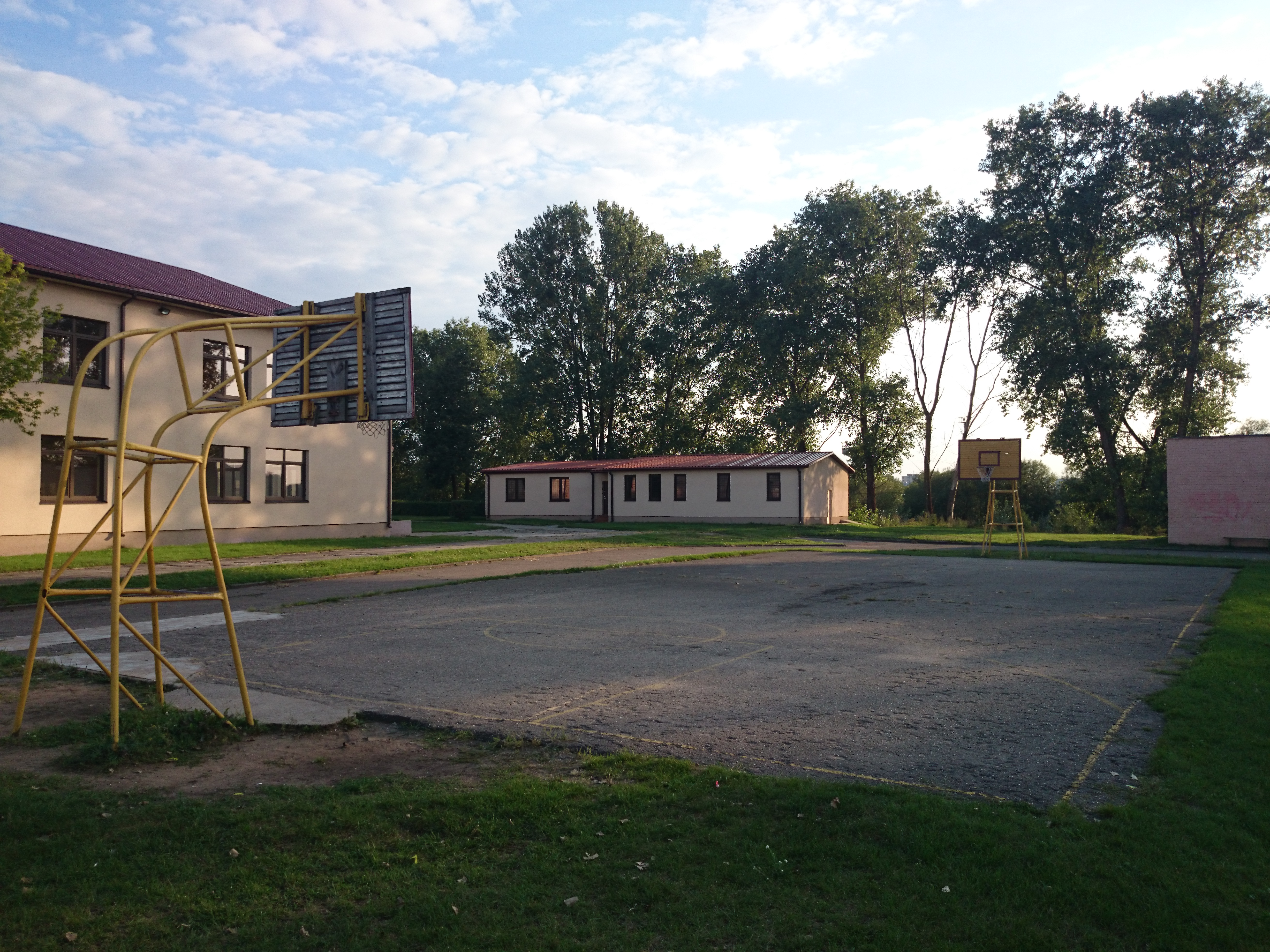 Lietavos pagrindinė mokykla